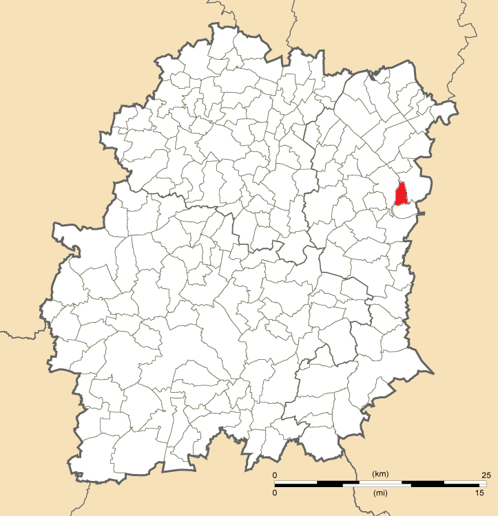 Carte de position de Saintry-sur-Seine en Essonne (91)